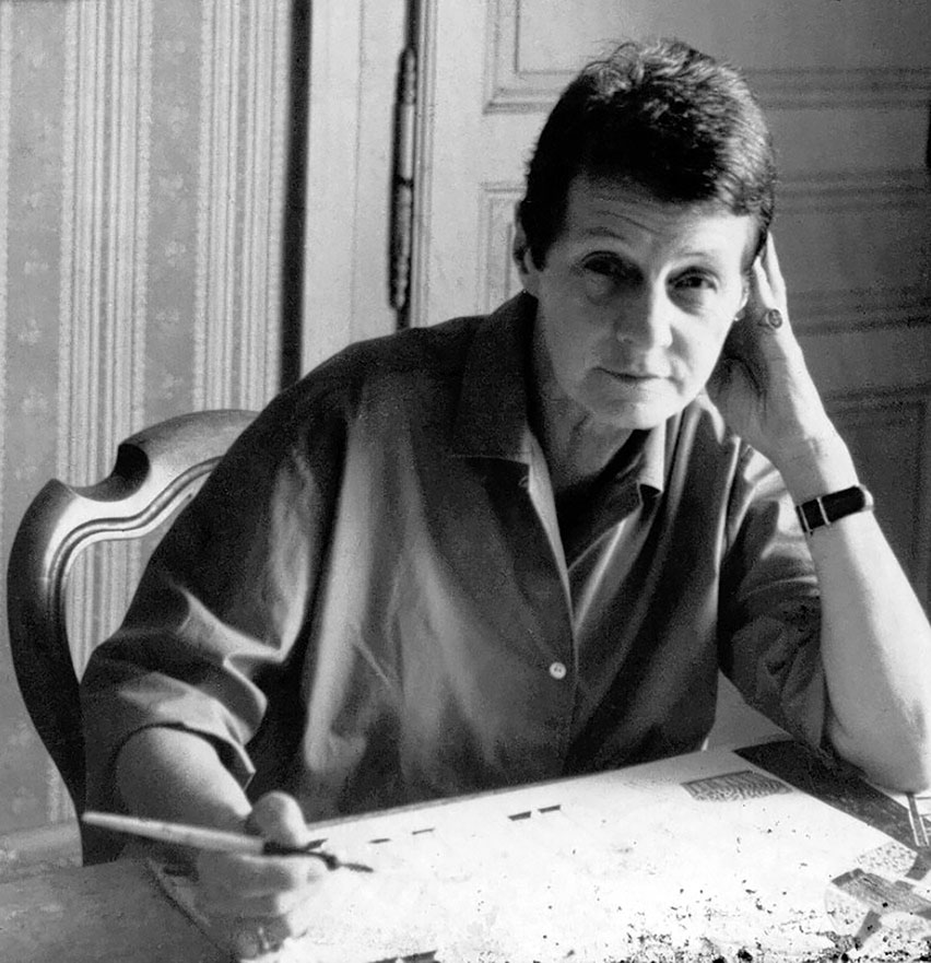 Portrait photographie noir et blanc de l'artiste-peintre Véronique Filozof-Sandreuter